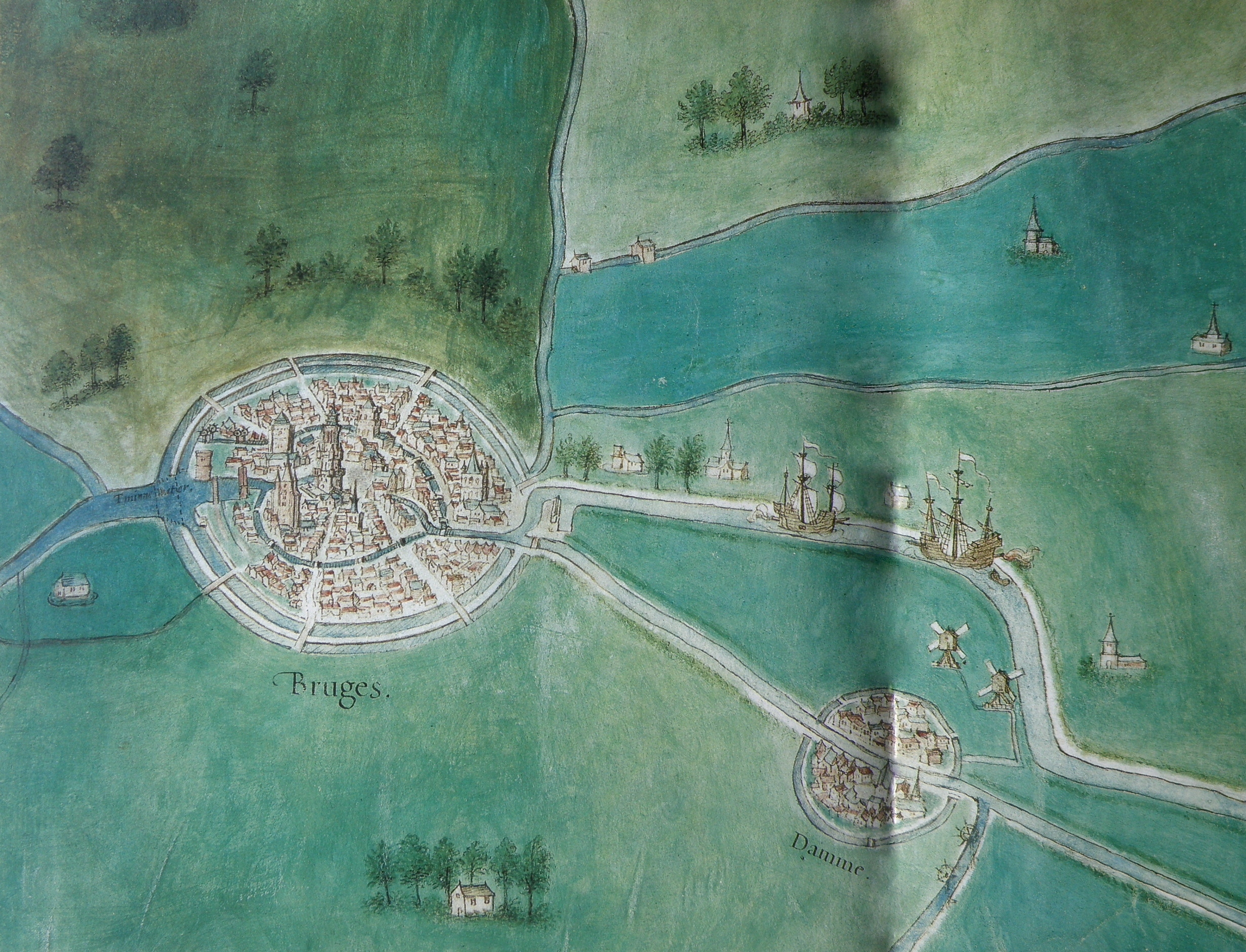 Anonieme kaart, 16de eeuw. Waterwegen tussen Brugge en Damme. Boven: Verse Vaart, ontstaan 1564-1566 door uitdiepen van de bedding van het Oude Zwin.